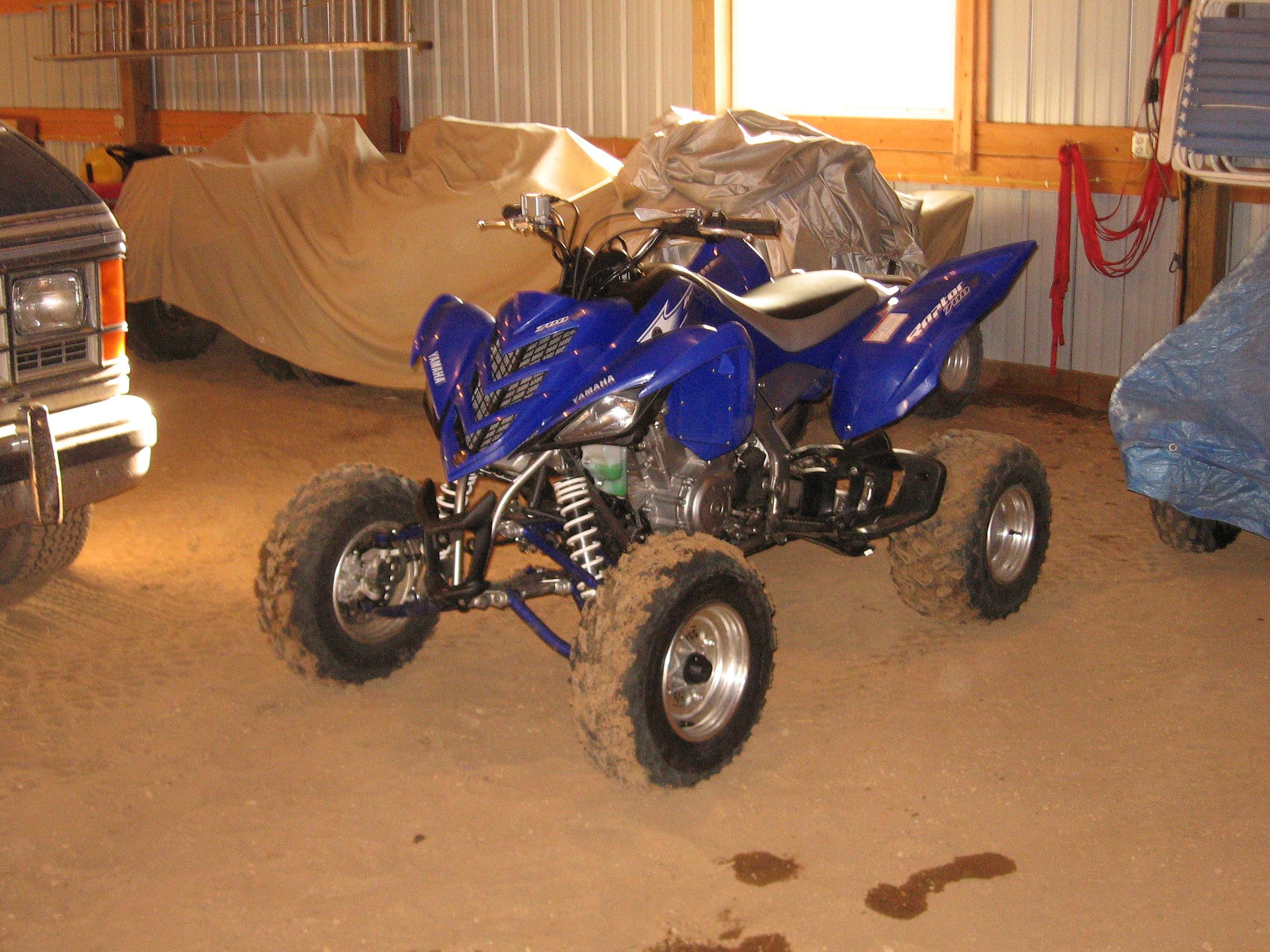 2007 Yamaha raptor 700r